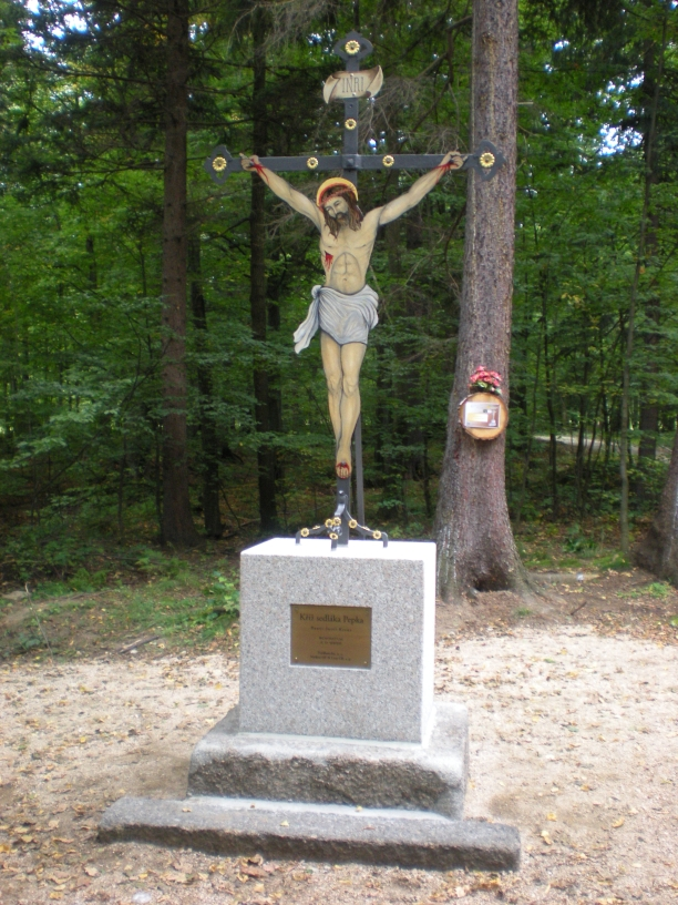 Bauer-Jusel-Kreiz, renovatum A.D. 2012, Alte Wallfahrtsweg Hemmrich-Haindorf Isergebirge